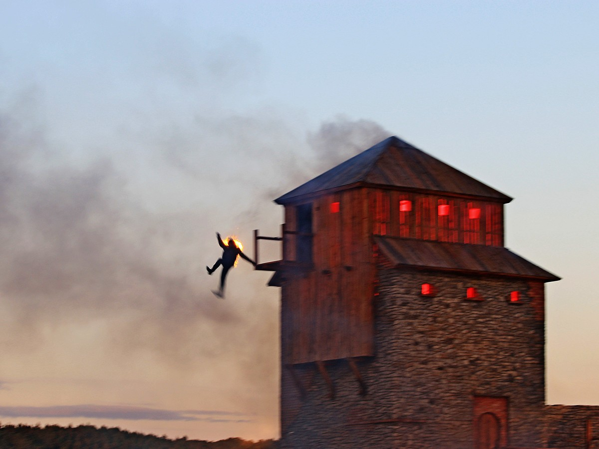 Feuerstunt bei den Störtebeker-Festspielen 2017